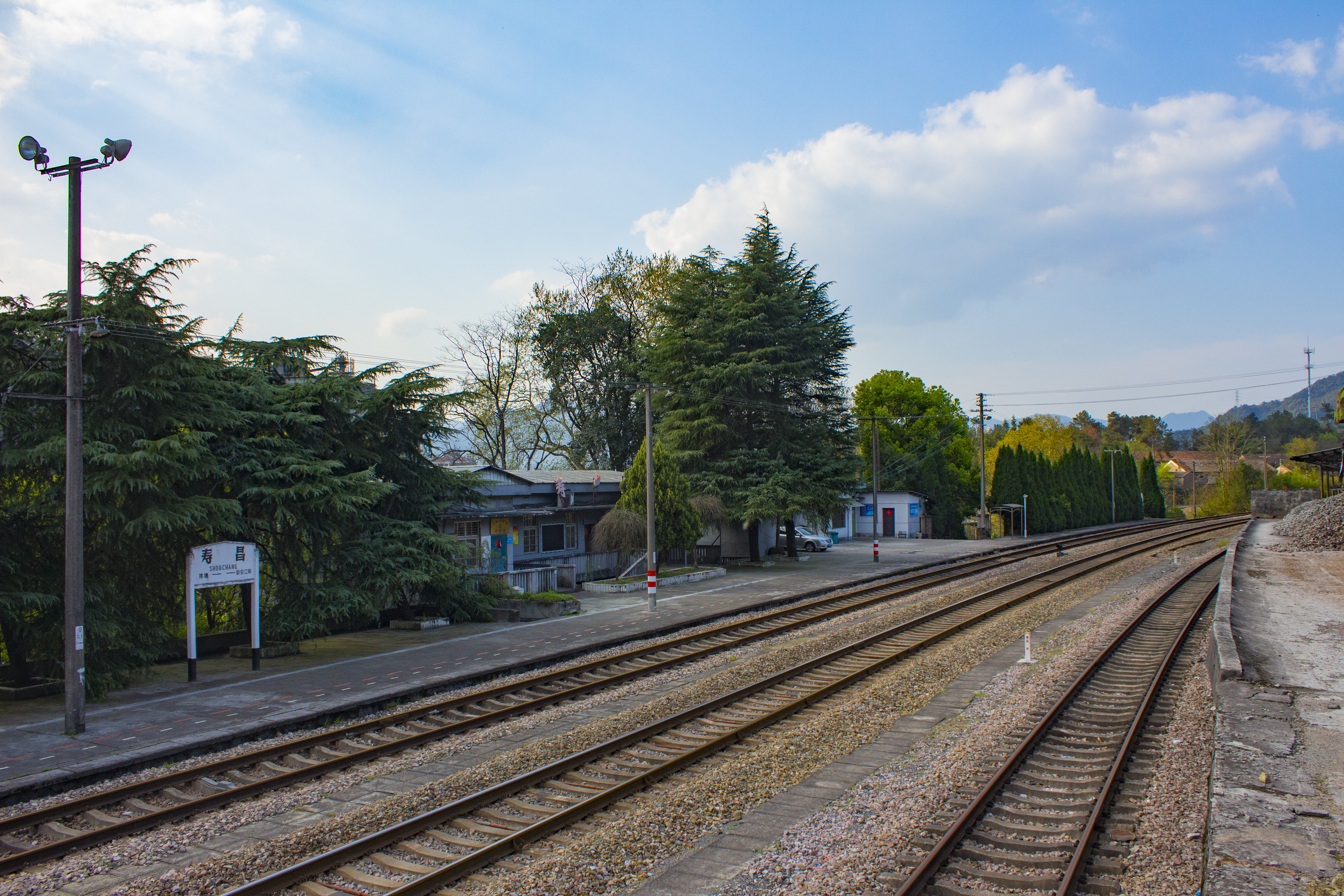 中文（中国大陆）: 2019-4-5金千线 寿昌站站房与股道